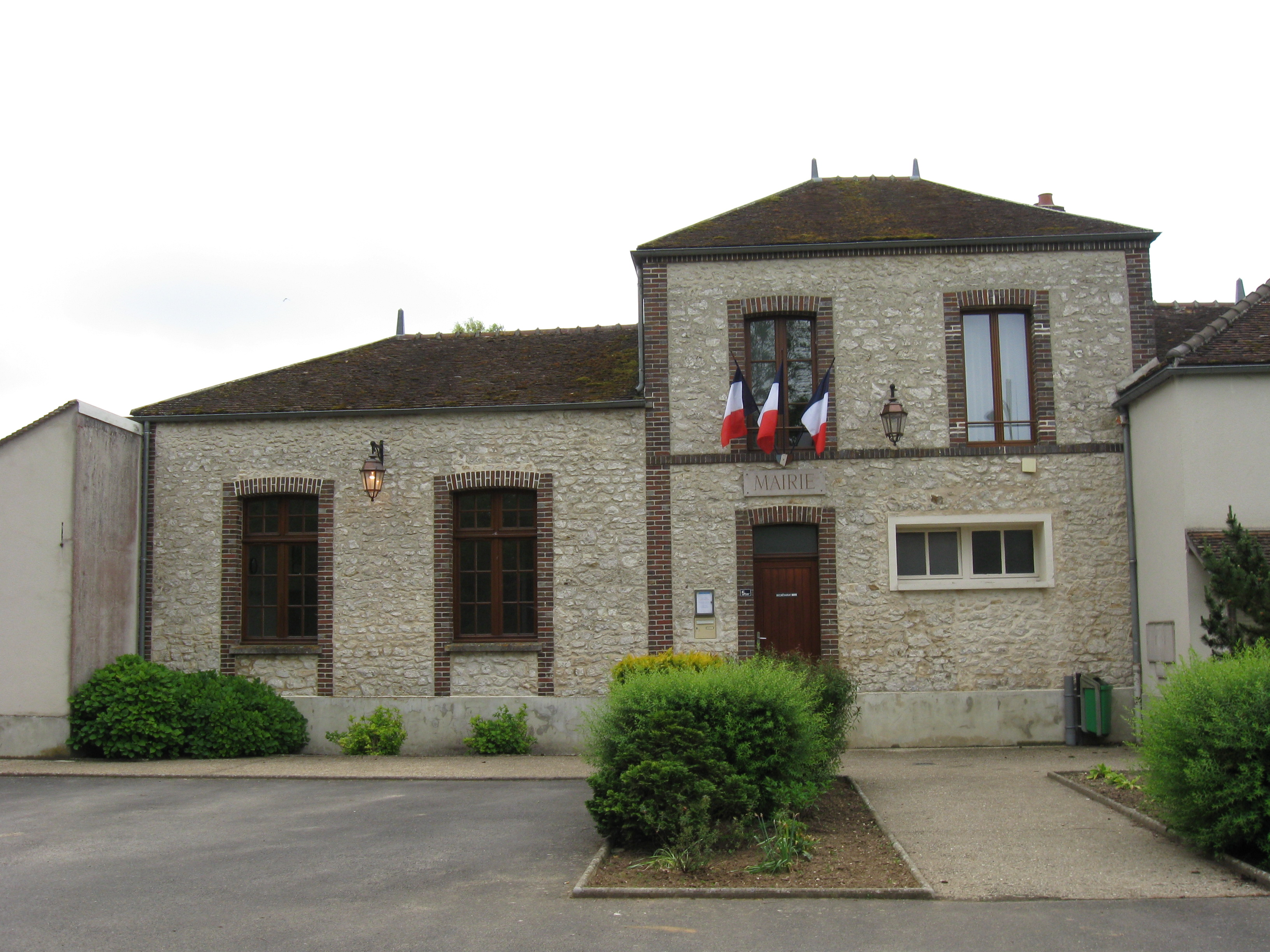 Mairie de Villuis. (Seine-et-Marne, région Île-de-France).